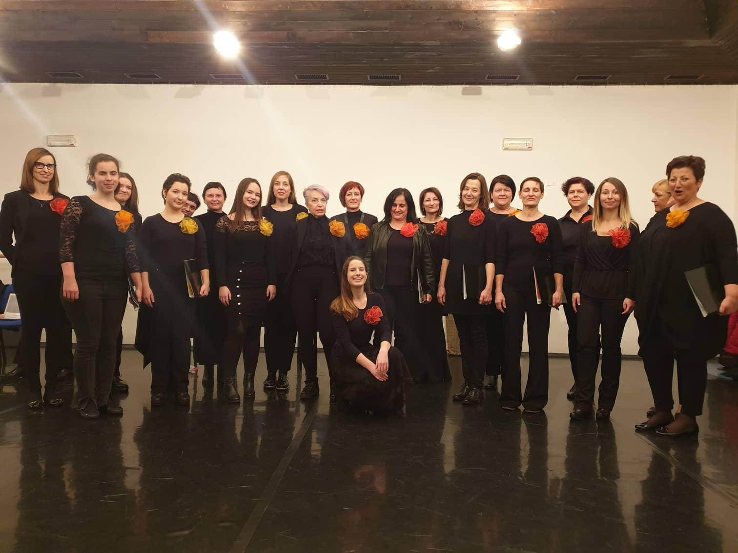 Prenovljeni zbor pred nastopom Večer, posvečen pesmi v izolskem Kulturnem domu, februarja 2019